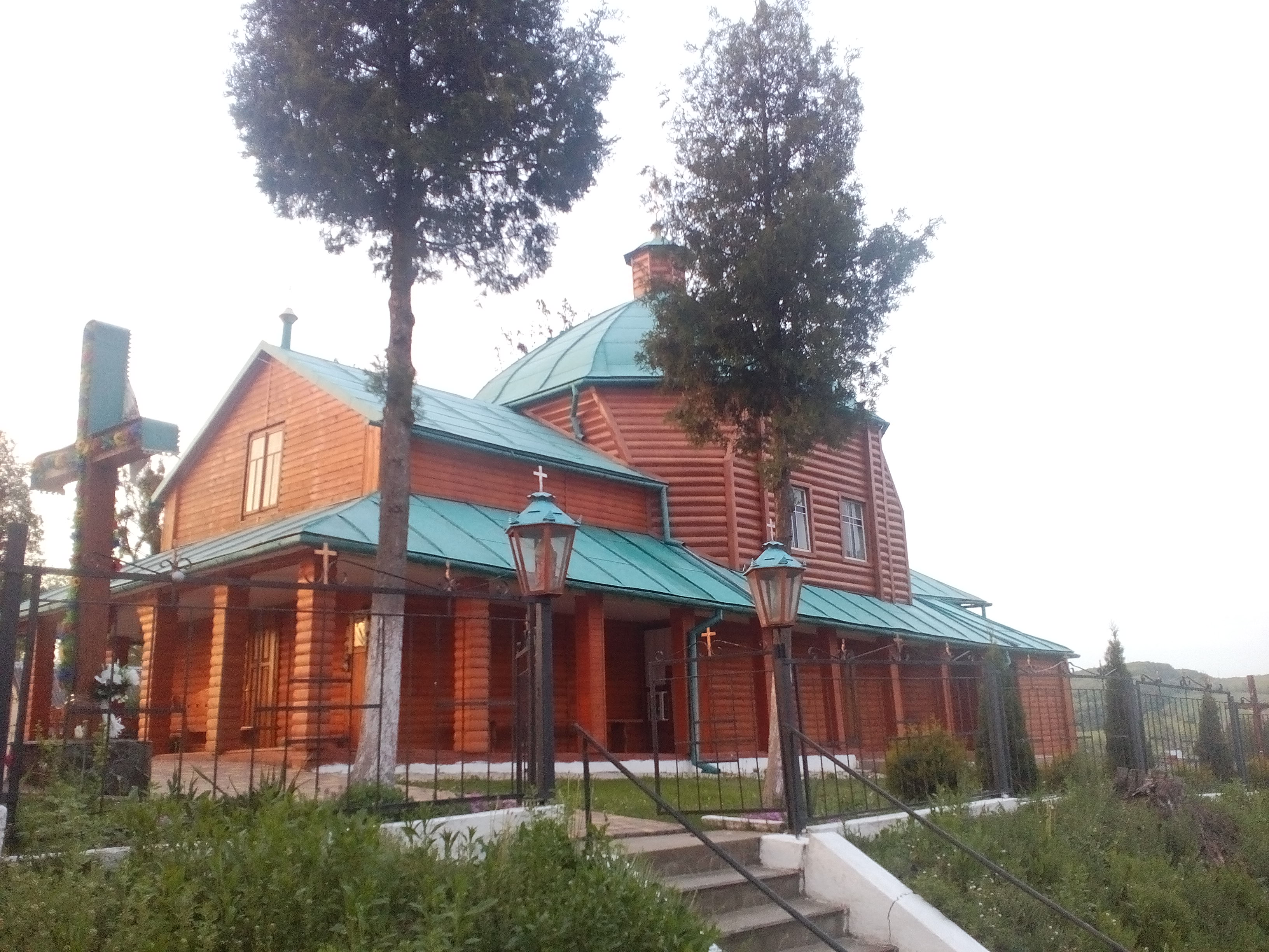 церква